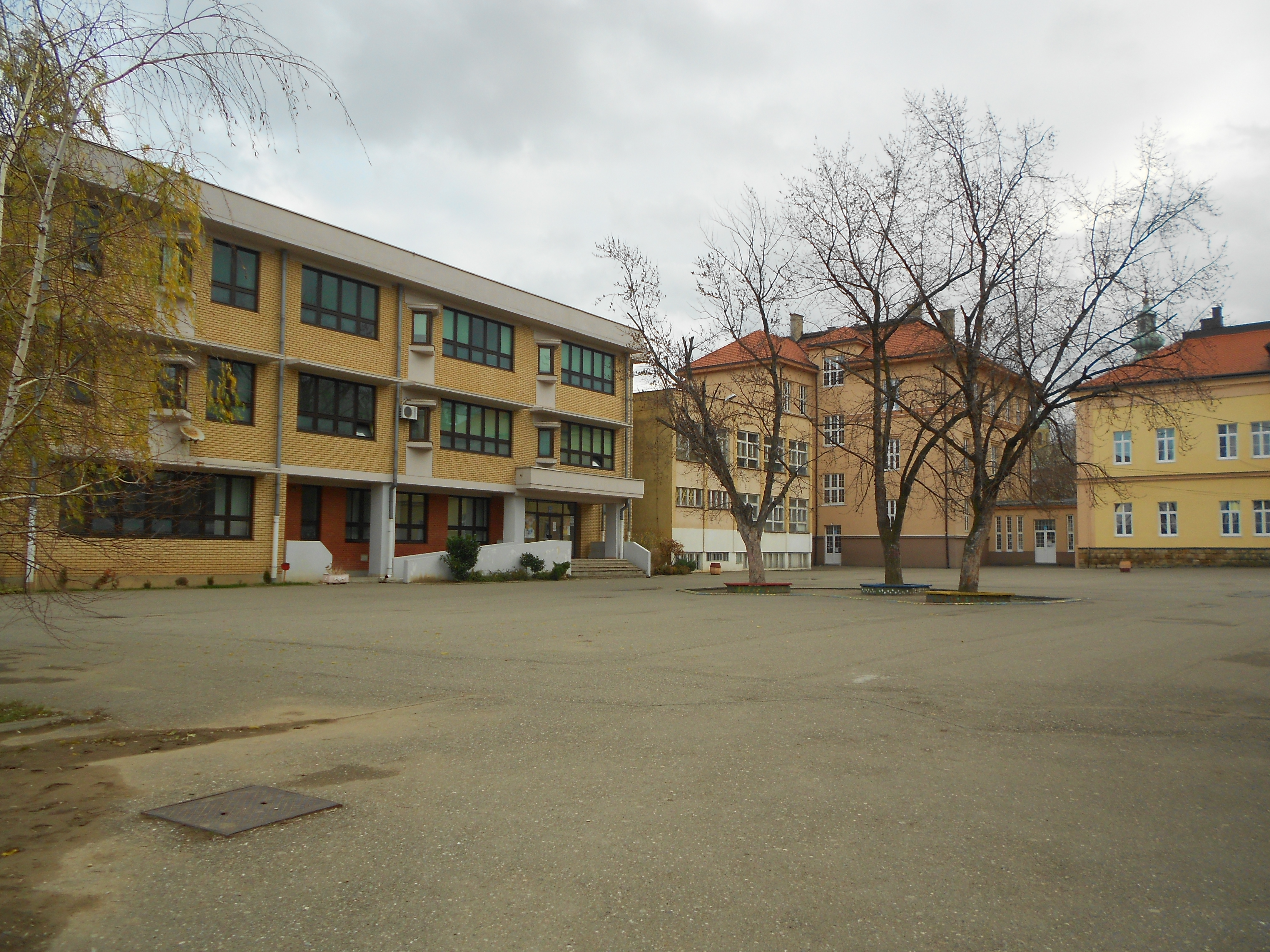 ОШ Свети Сава у Бијељини